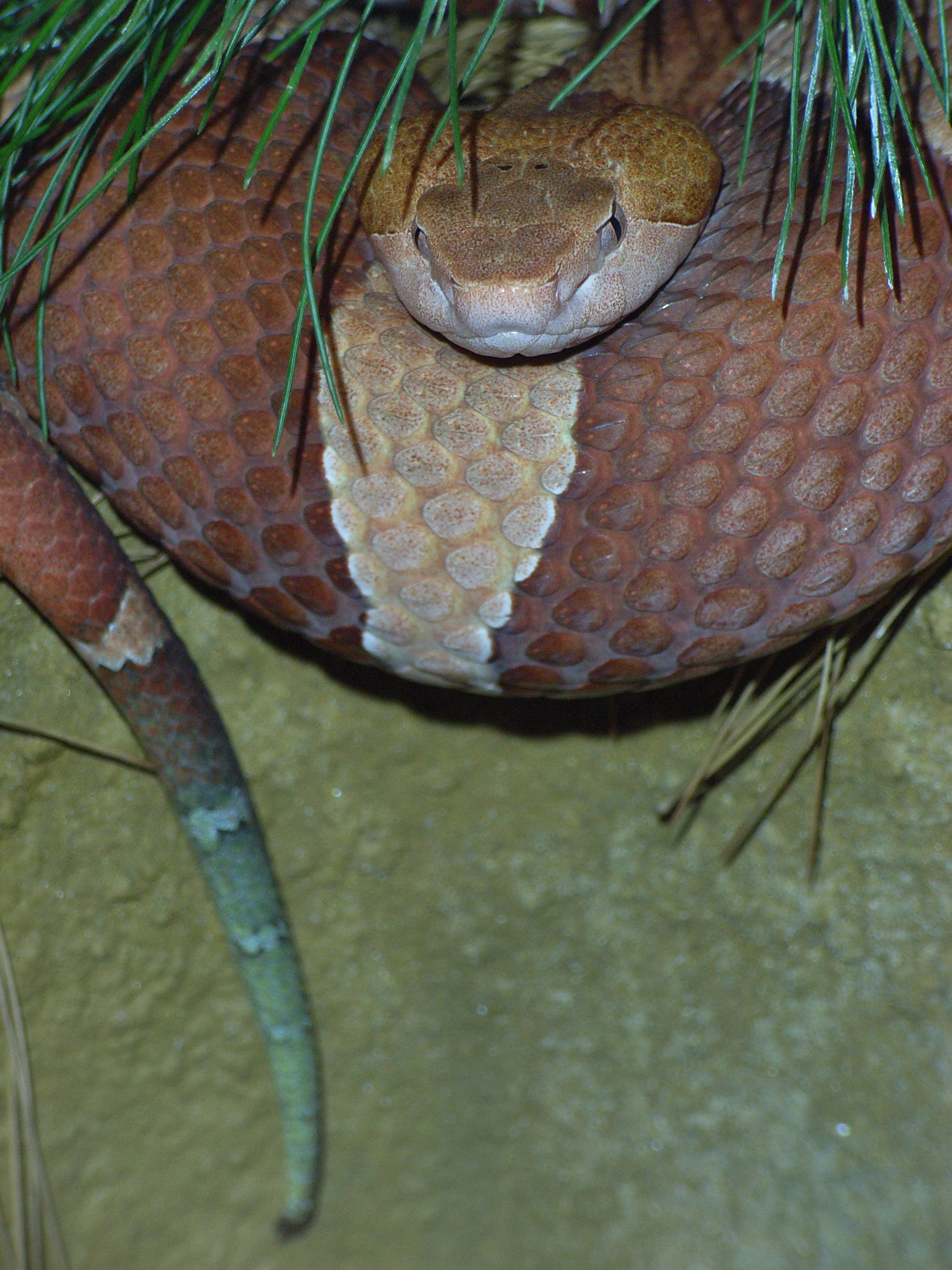 Breitbandkupferkopf (Agkistrodon contortrix laticinctus) mit typisch grünlicher Schwanzspitze. Fotografiert während der 5. Dresdner Terrarienschau 2007 "Von Kupferköpfen und Korallenfingern"